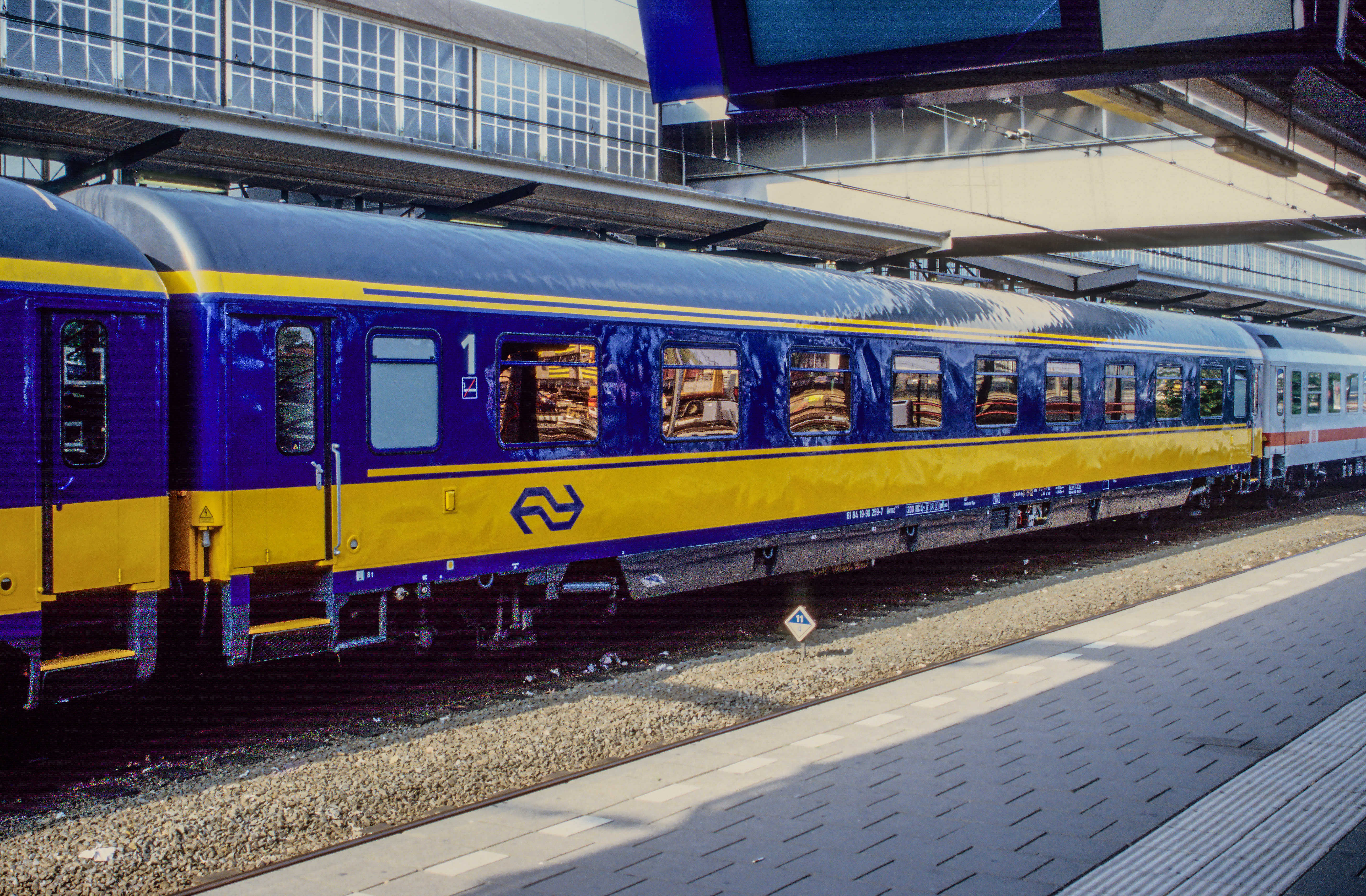 61 84 19-91 259-7 IC 1524 Deventer - Amsterdam Centraal Amersfoort 04-06-2007 T200706-0003